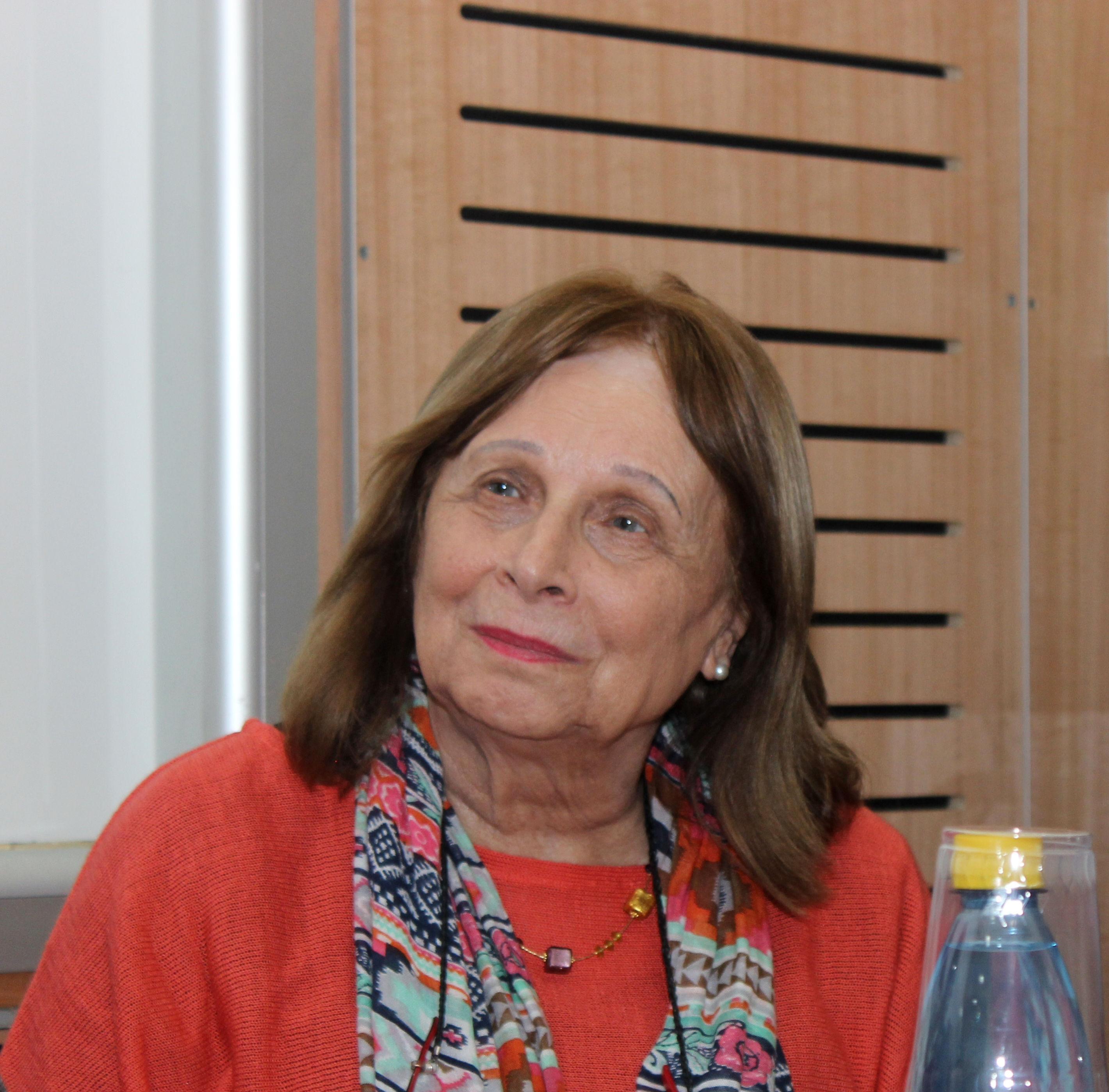 La sicóloga y escritora chilena Neva Milicic en la Casa Central de la Pontificia Universidad Católica de Chile durante la primera etapa del Festival de Autores de Santiago 2018.